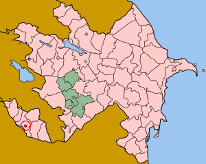 Map of Azerbaijan showing Nakhichevan (Naxçıvan) sahar.